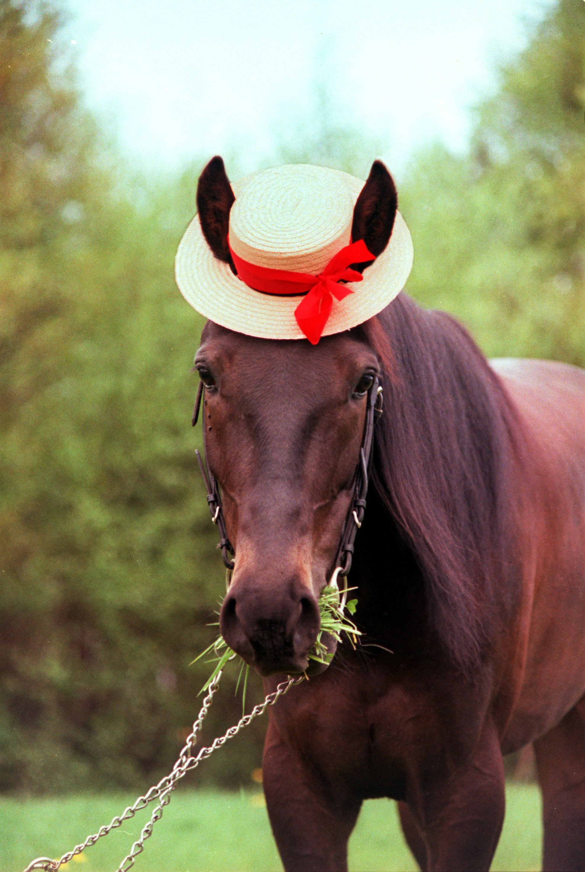 Travaren Legolas med en halmhatt.